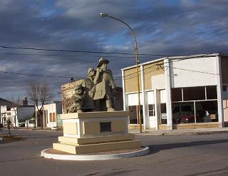 Monumento al Inmigrante.Autor Sergio Caraduje Ubicacion:San Cayetano-Buenos Aires-Argentina